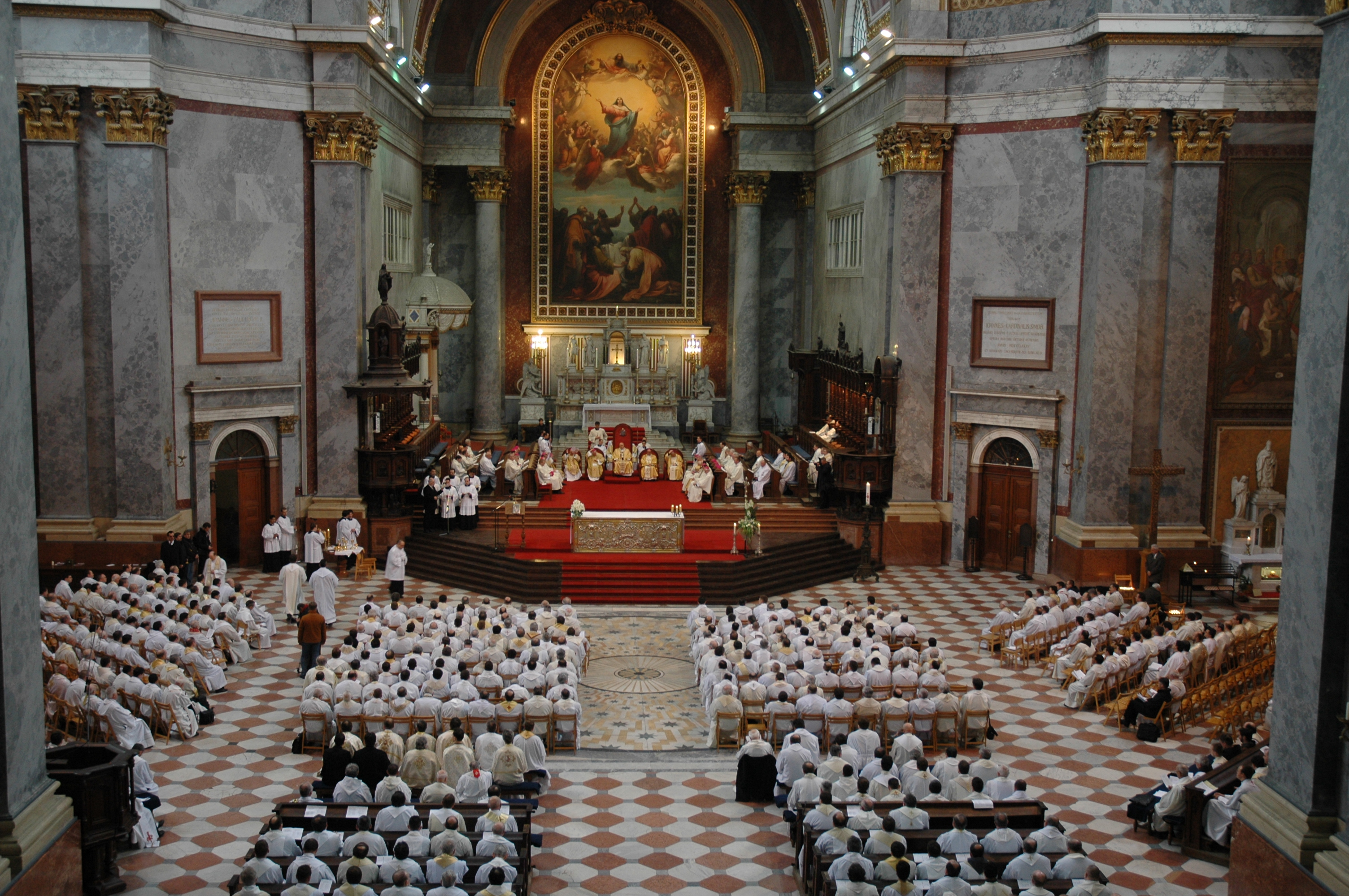 Az esztergomi bazilika az orgonától nézve